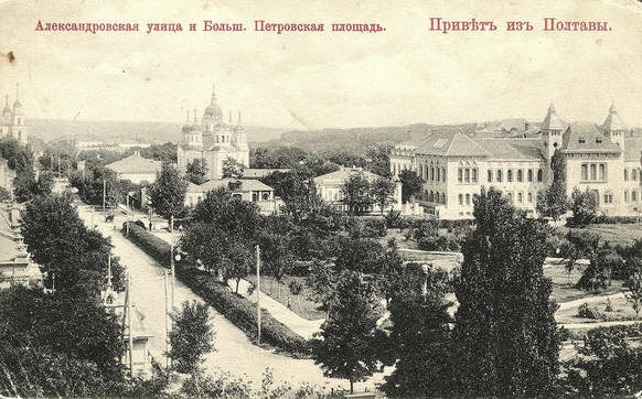 Олександрівська вулиця і Велика Петровська площа. Ліворуч - Успенський собор, у центрі - Воскресенська церква, праворуч - Будинок губернського земства , початок 20 століття